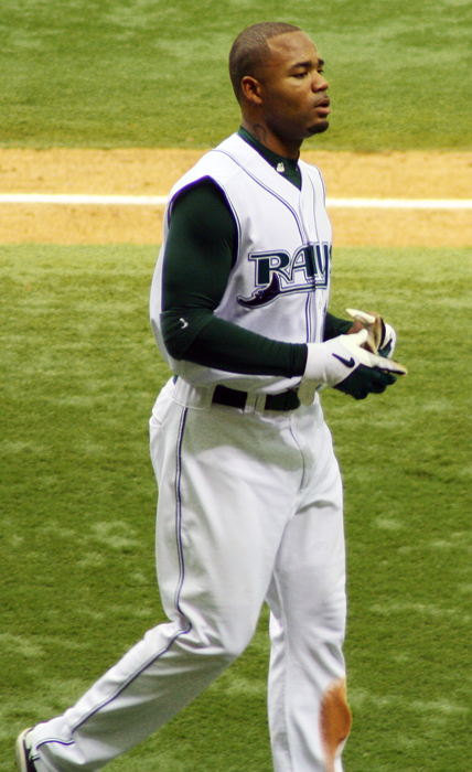 Photo by Googie Man 20:54, 30 April 2006 . . Googie man . . 428×700 (312 KB)